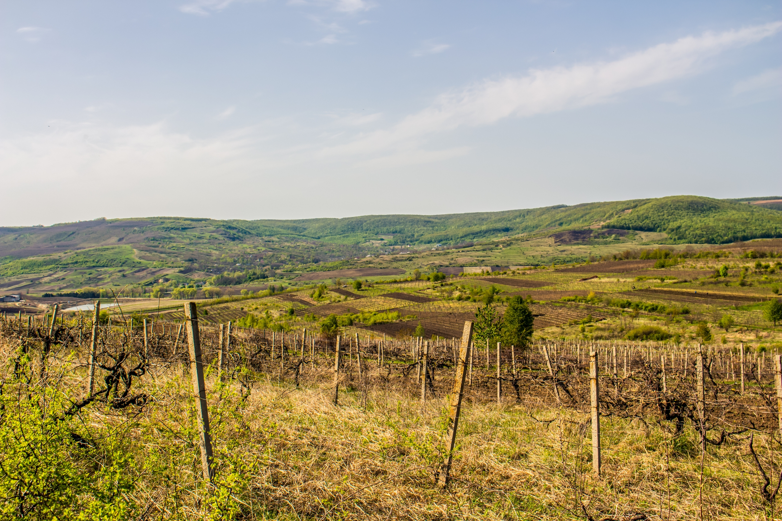 Долна, монумент природы, находится в Ниспоренский район, Южнее с. Долна, Юрченское лесничество, урочище Долна, кварталы 4-6 (код MD-NS-rp-026)